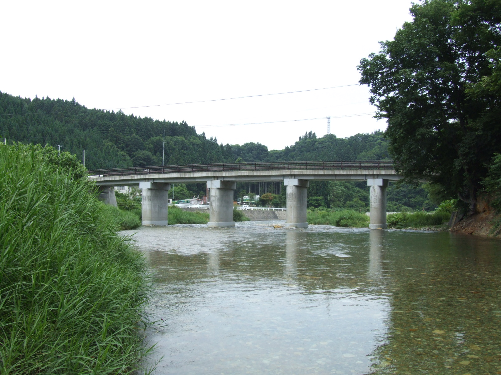 Nokawa Bridge. Sendai, Miyagi prefecture, Japan.